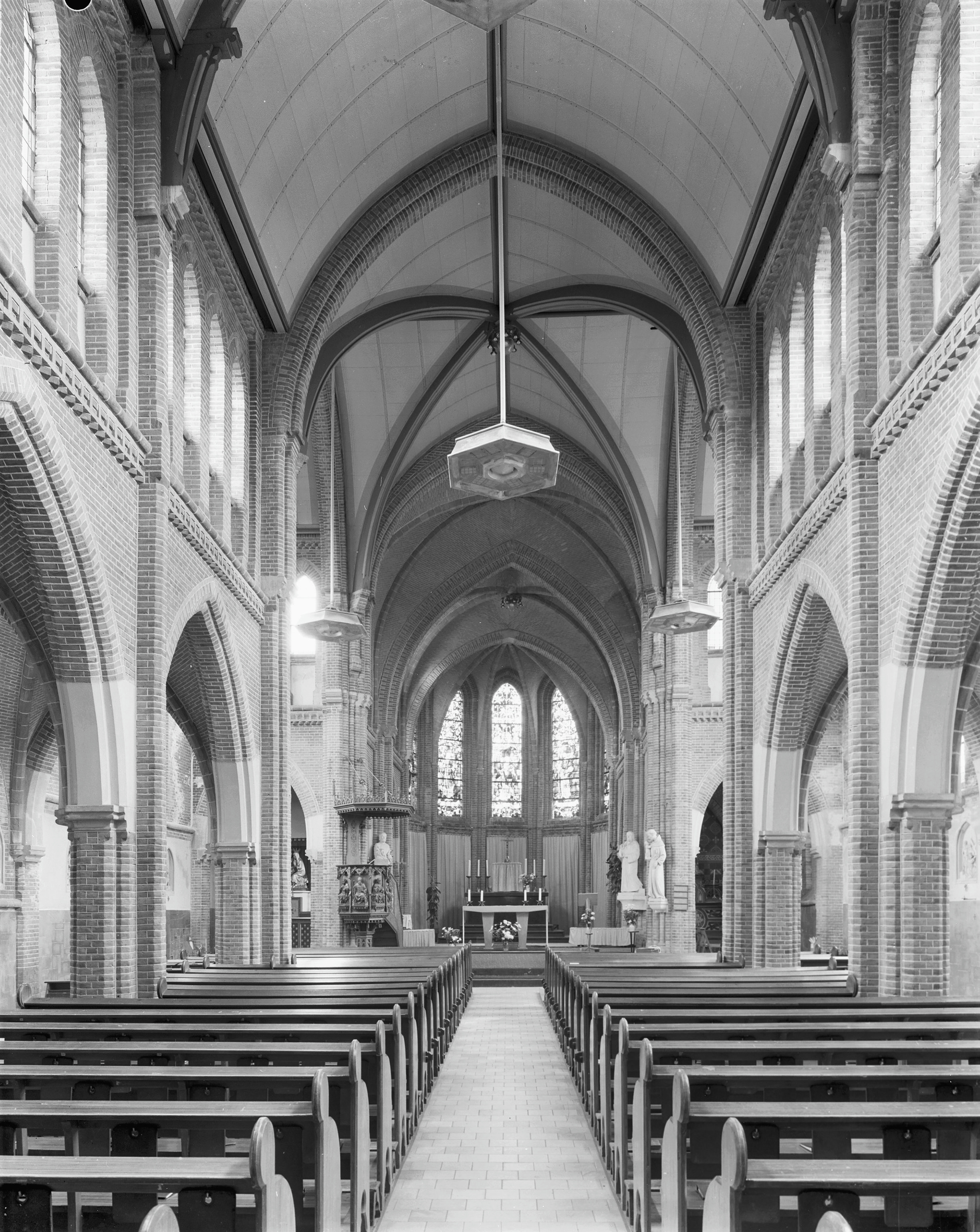 R.K.St.Martinuskerk: interieur